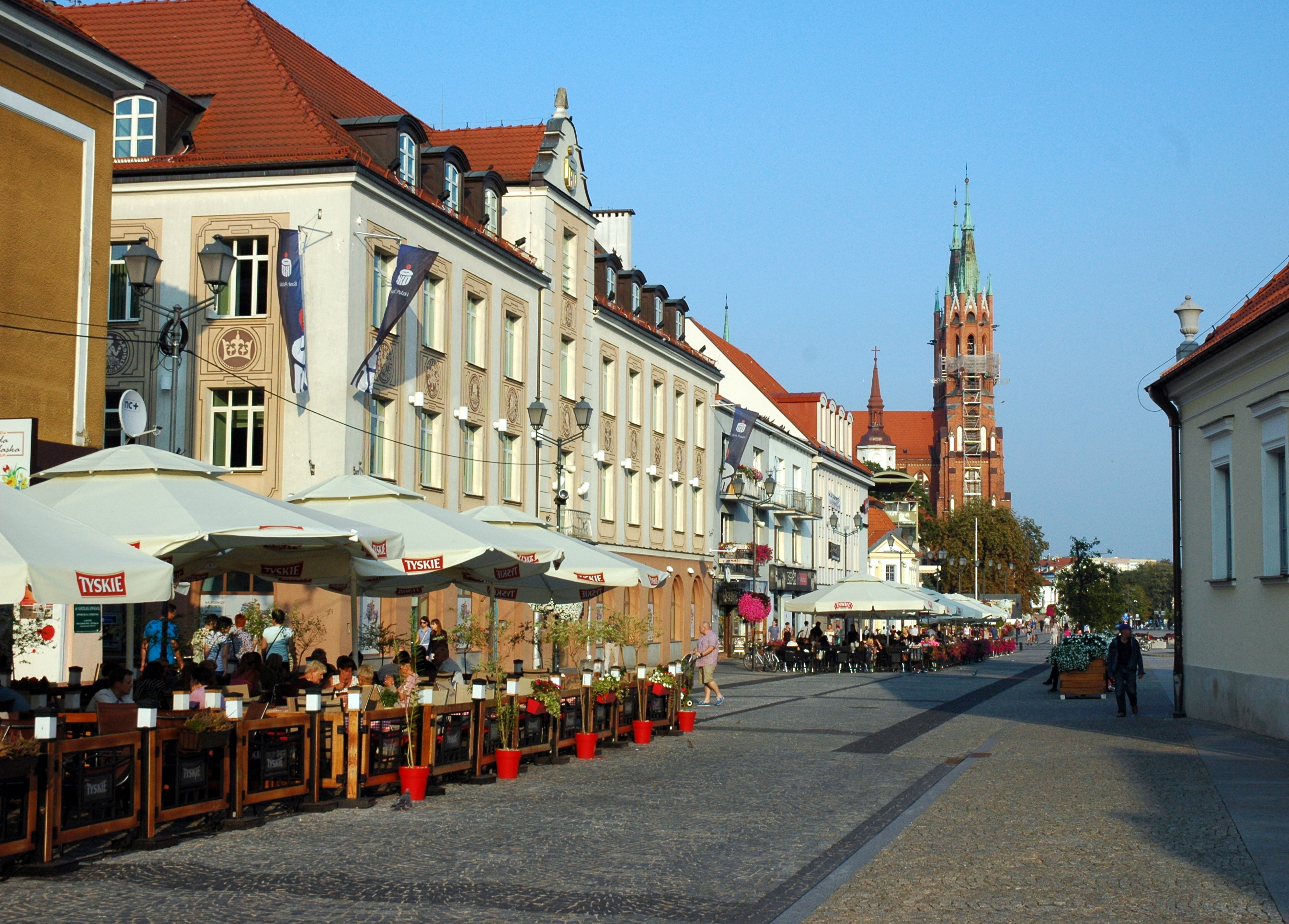 Białystok - rynek Kościuszki